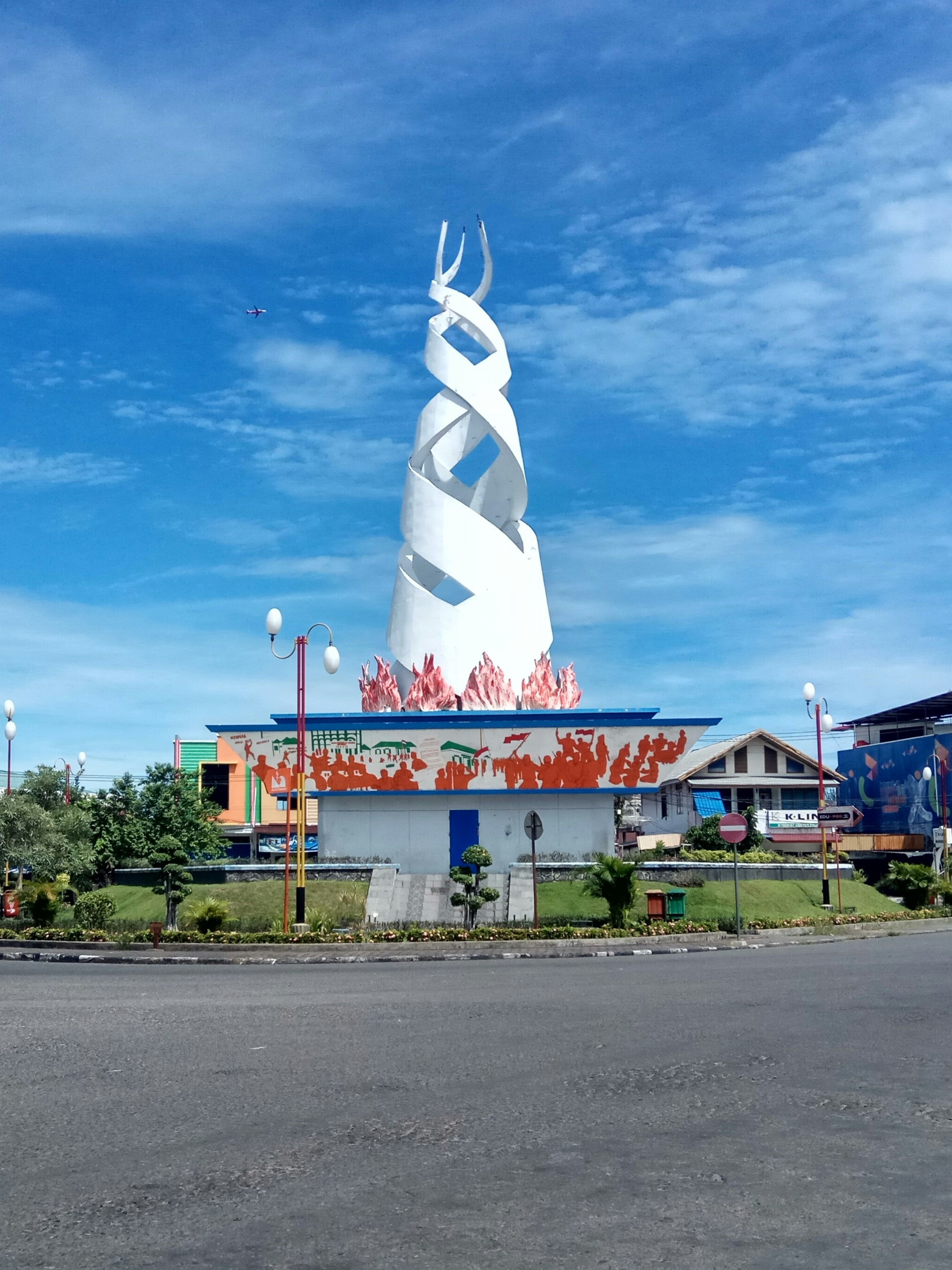 Tetenger Padang Tugu Simpang Haru